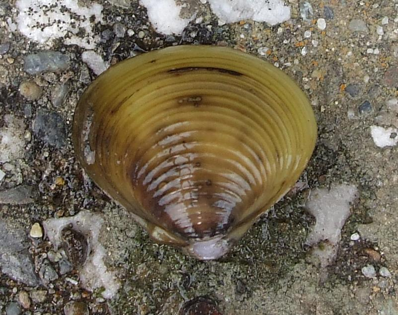 タイワンシジミの殻